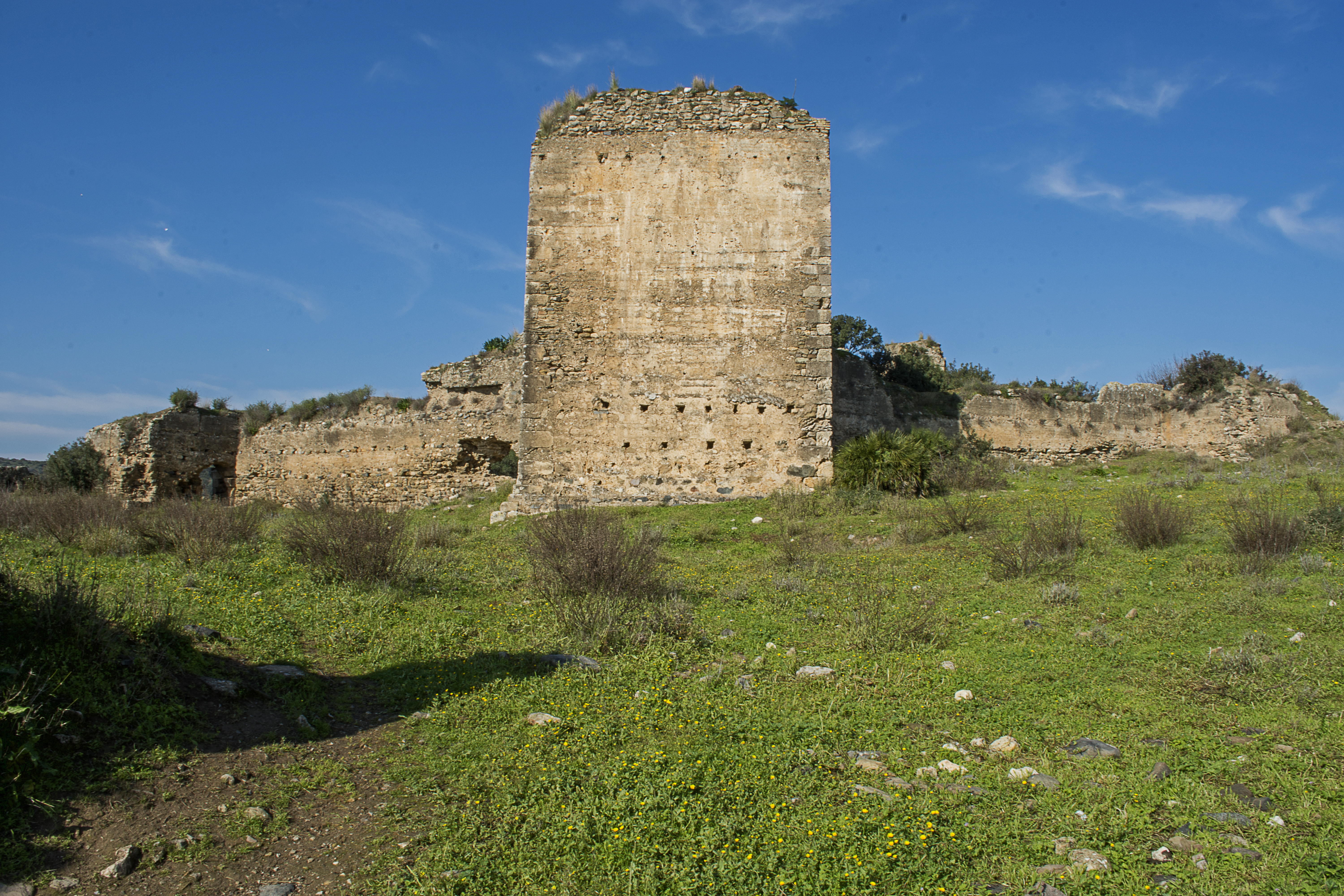 Castillo de Setefilla en el término municipal de Lora del Río. (España)